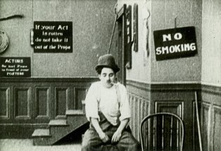 Escena de la película The Property Man de Charlie Chaplin.